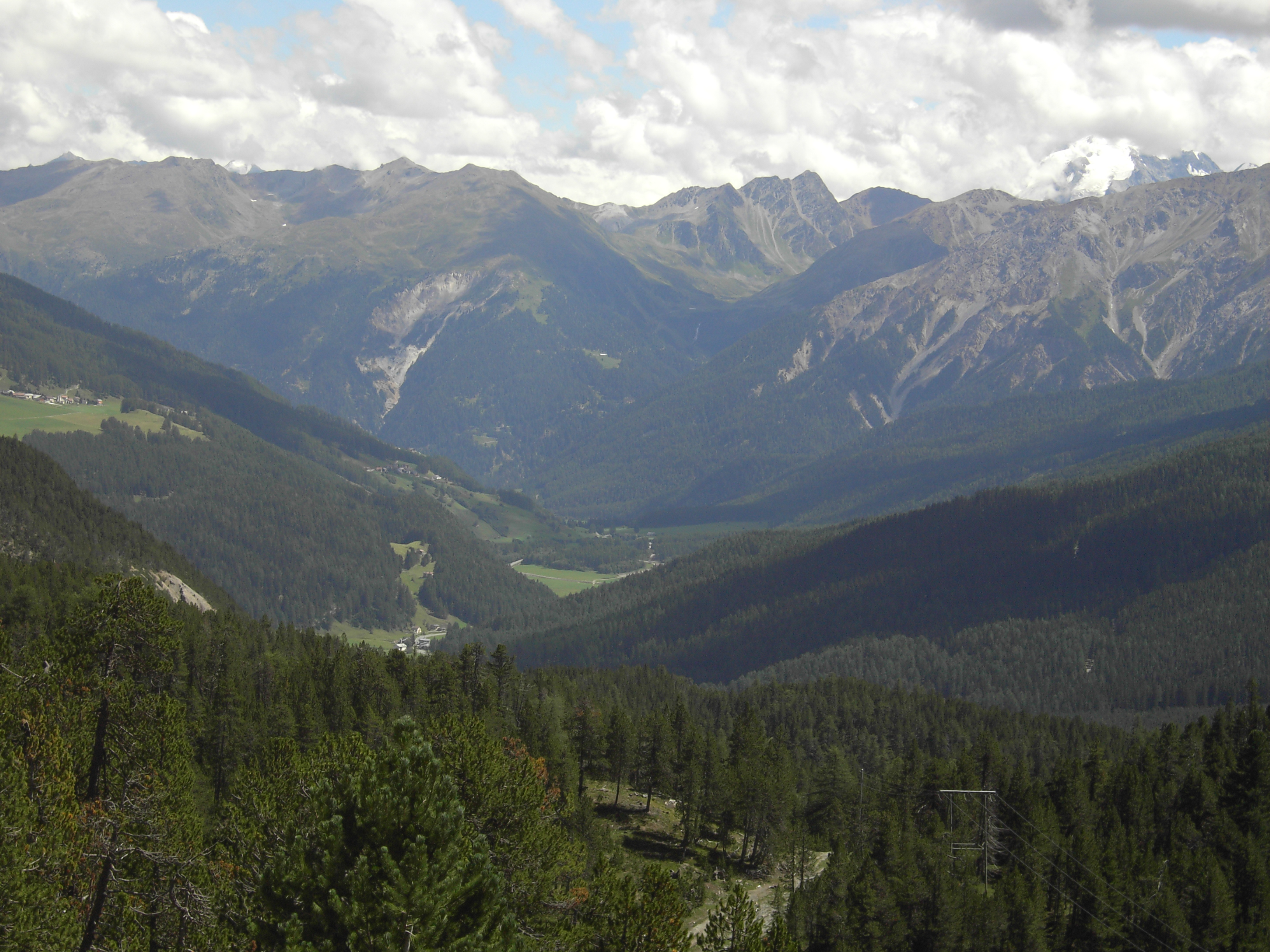 Val Müstair/Graubünden/Switzerland